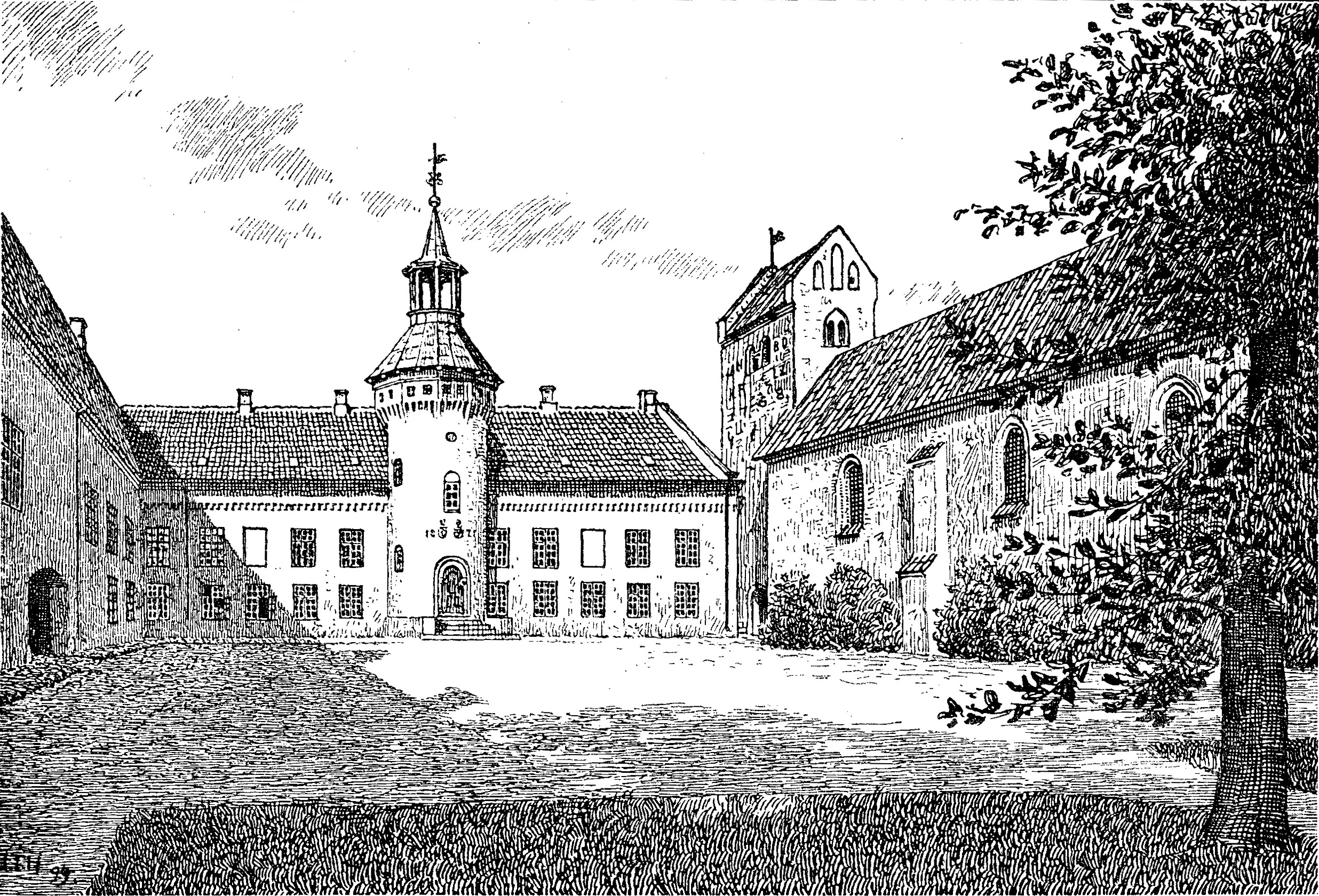 Oksholm, Oxholm eller Ø Kloster i Øland Sogn, Øster Han Herred, Jammerbugt Kommune. i Jylland Denmark